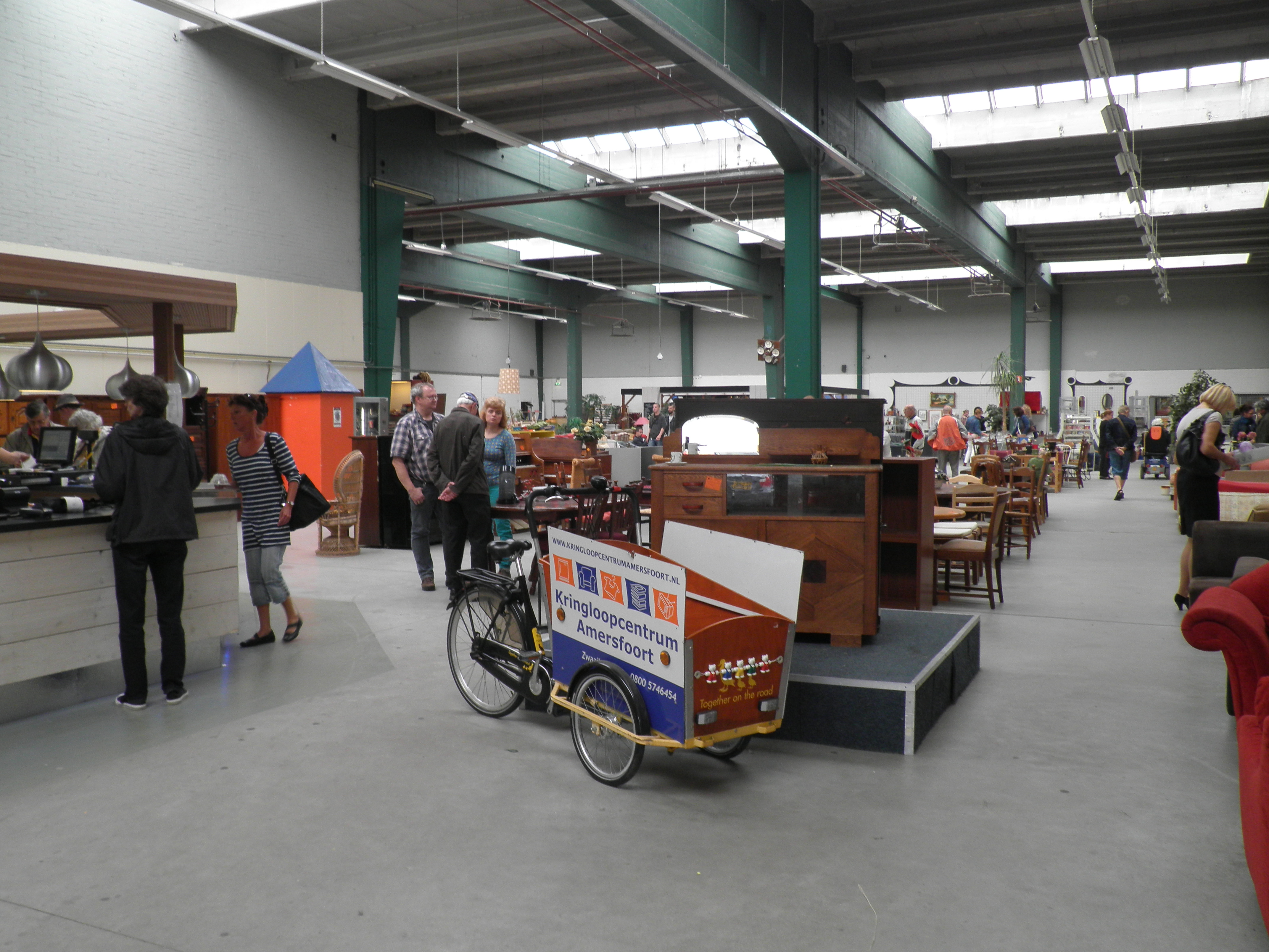 Magasin de recyclage